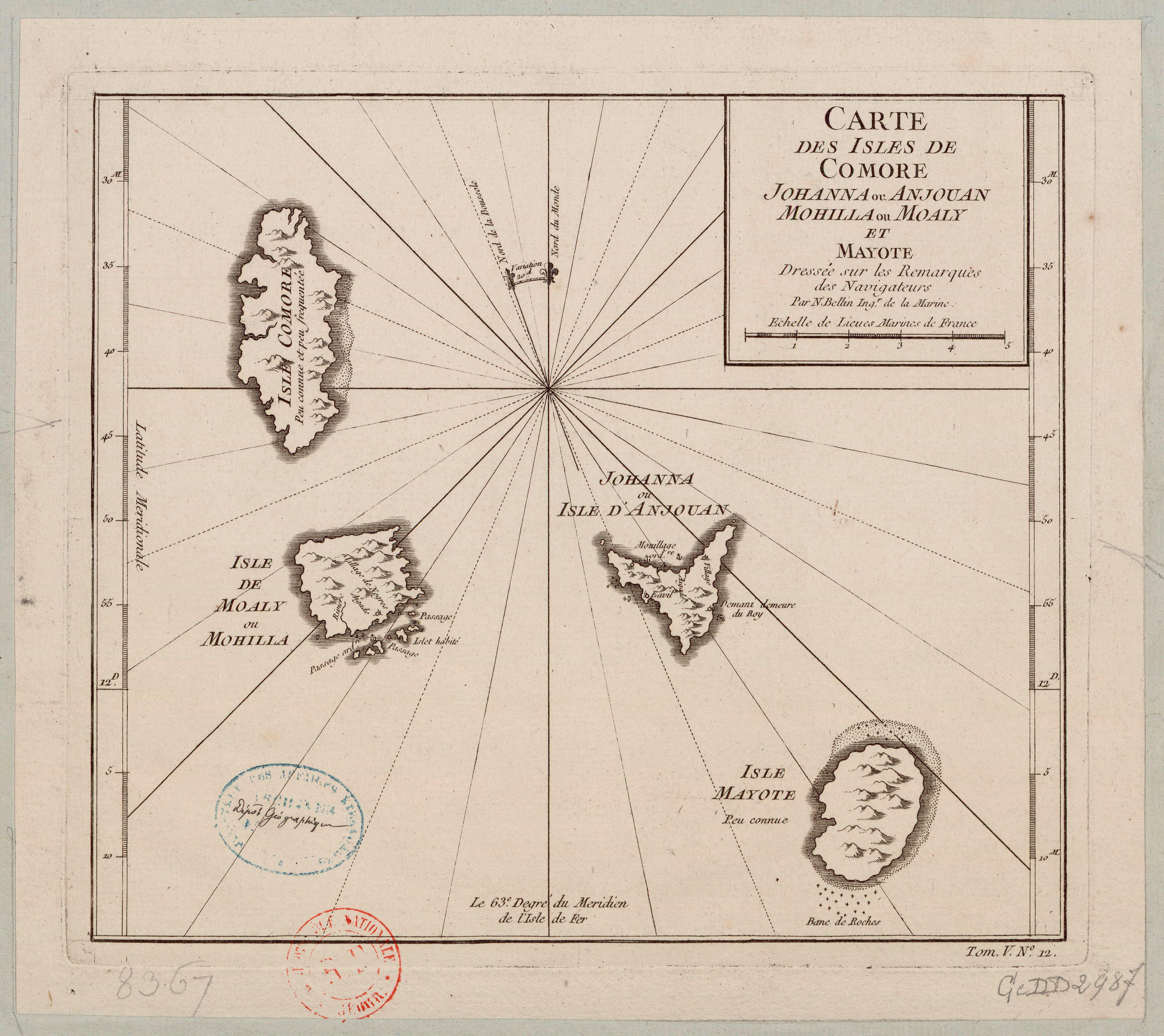 Jacques-Nicolas Bellin, (1703-1772 ), Cartographe.- Carte des isles de Comore Johanna ou Anjouan Mohilla ou Moaly et Mayote, Paris, 1747. Description matérielle : 1 carte ; 25,5 x 29 cm